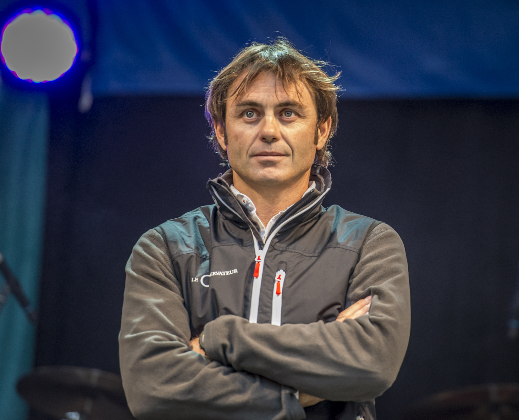 YANNICK BESTAVEN sur LE CONSERVATEUR